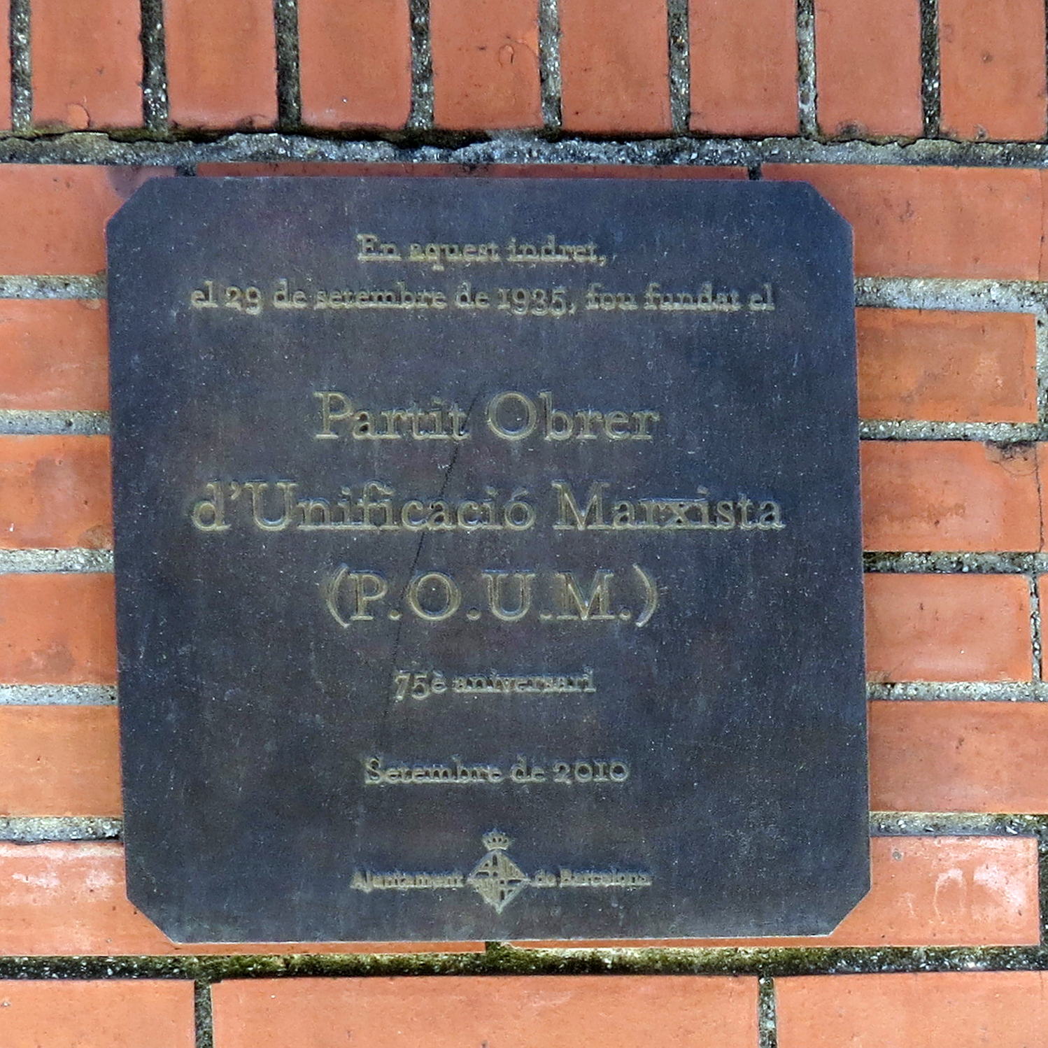 PARTIT OBRER D'UNIFICACIÓ MARXISTA (P.O.U.M.). C. Montserrat de Casanovas, 106 (Barcelona)